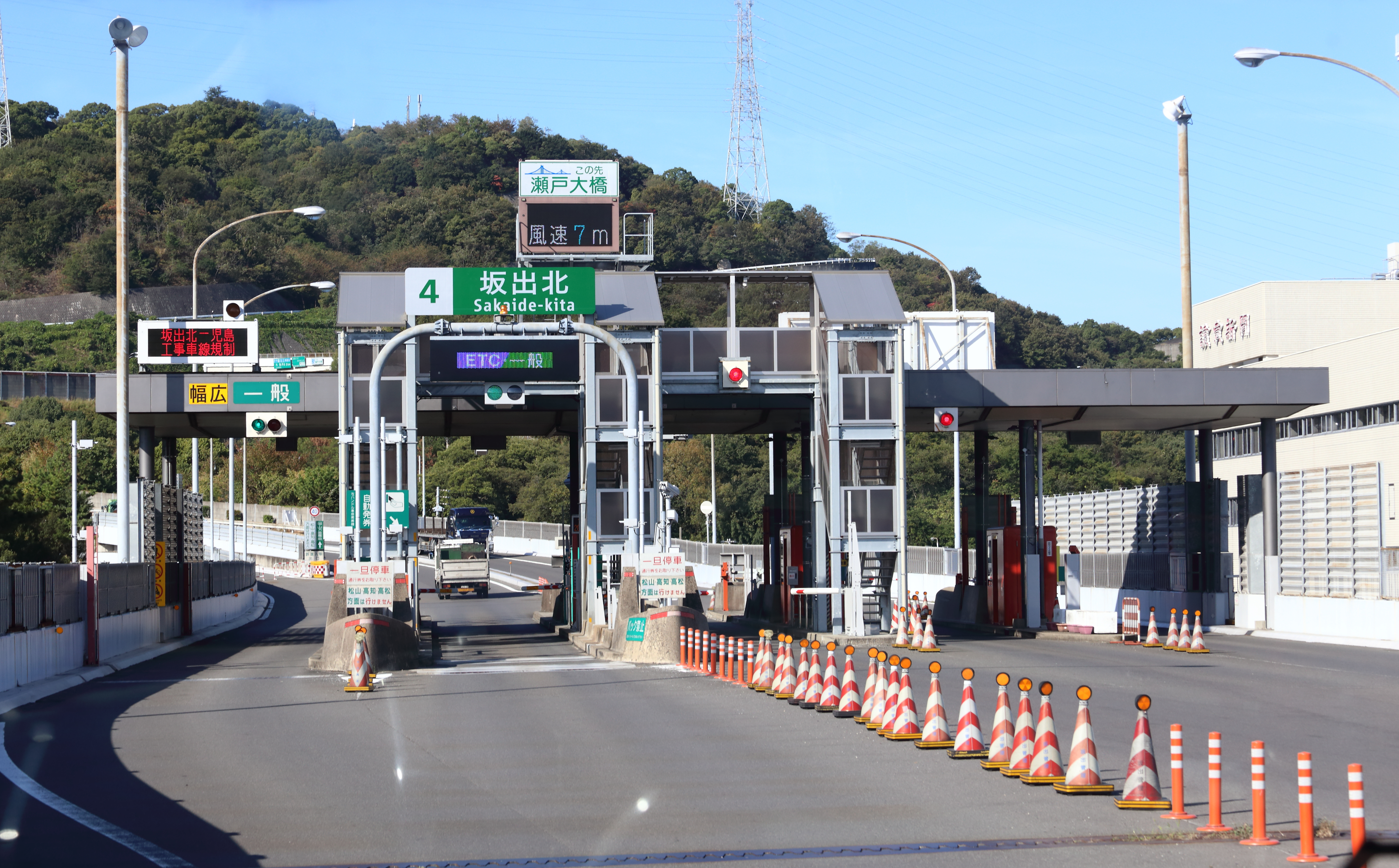 瀬戸中央自動車道 坂出北インターチェンジ 香川県坂出市西大浜北４丁目